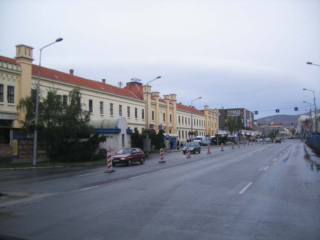 Nitra - Štefánikova trieda (časť hlavnej cesty 64)